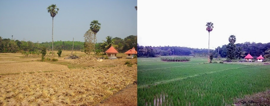 ഒരേ സ്ഥലം രണ്ടു സമയം ! കുണ്ടുവമ്പാടം ശ്രീകൃഷ്ണ ക്ഷേത്രപരിസരം !